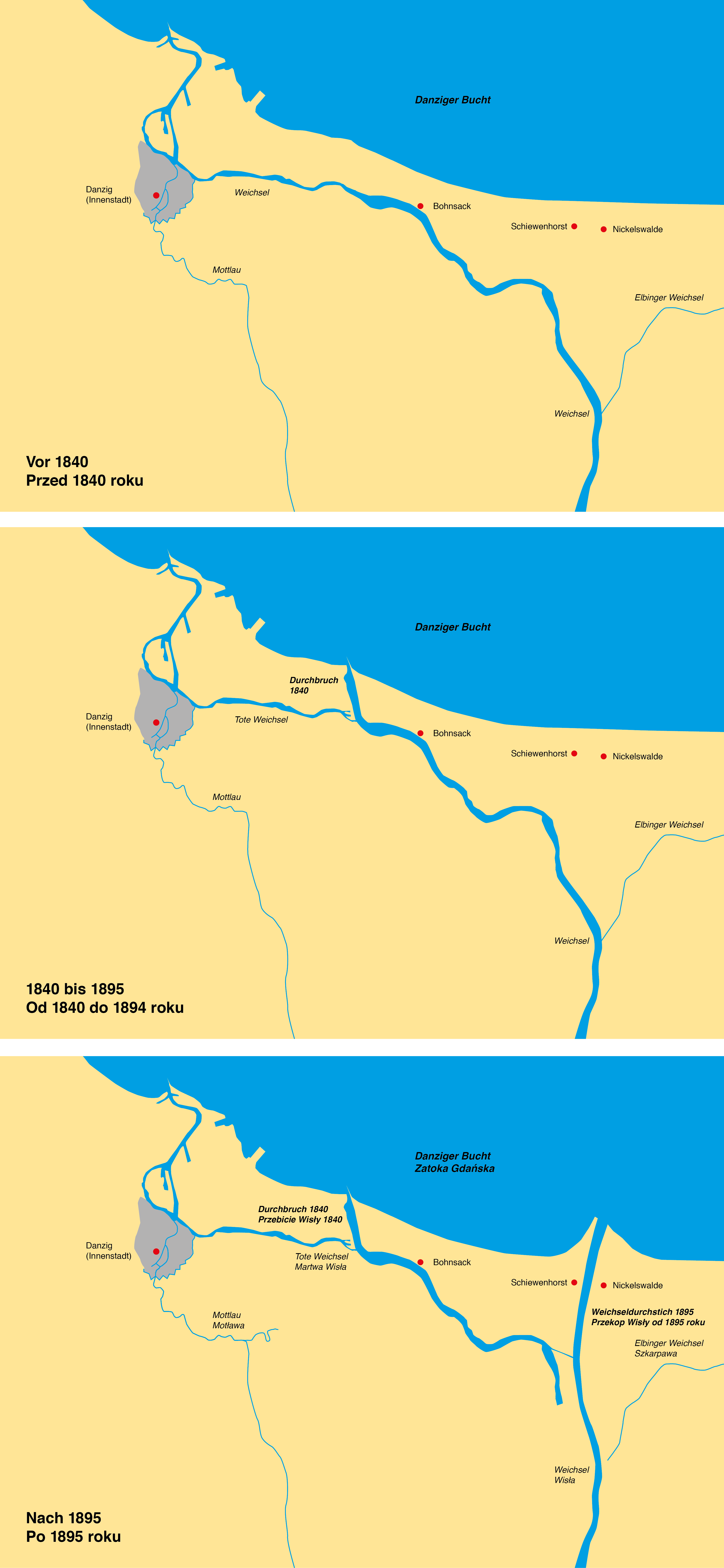 Entstehung der Bohnsacker Insel (Neue Binnennehrung / Wyspa Sobieszewska) im Weichseldelta in den Jahren 1839 bis 1895.